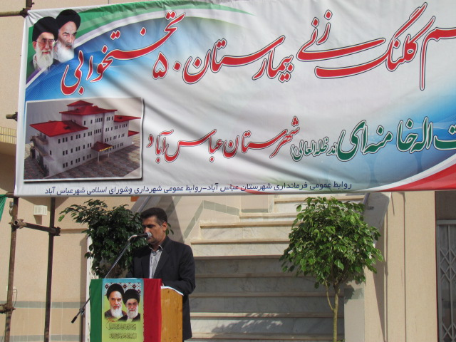 سخنرانی دکتر علی اصغر موسی پسندی در افتتاحیه بیمارستان